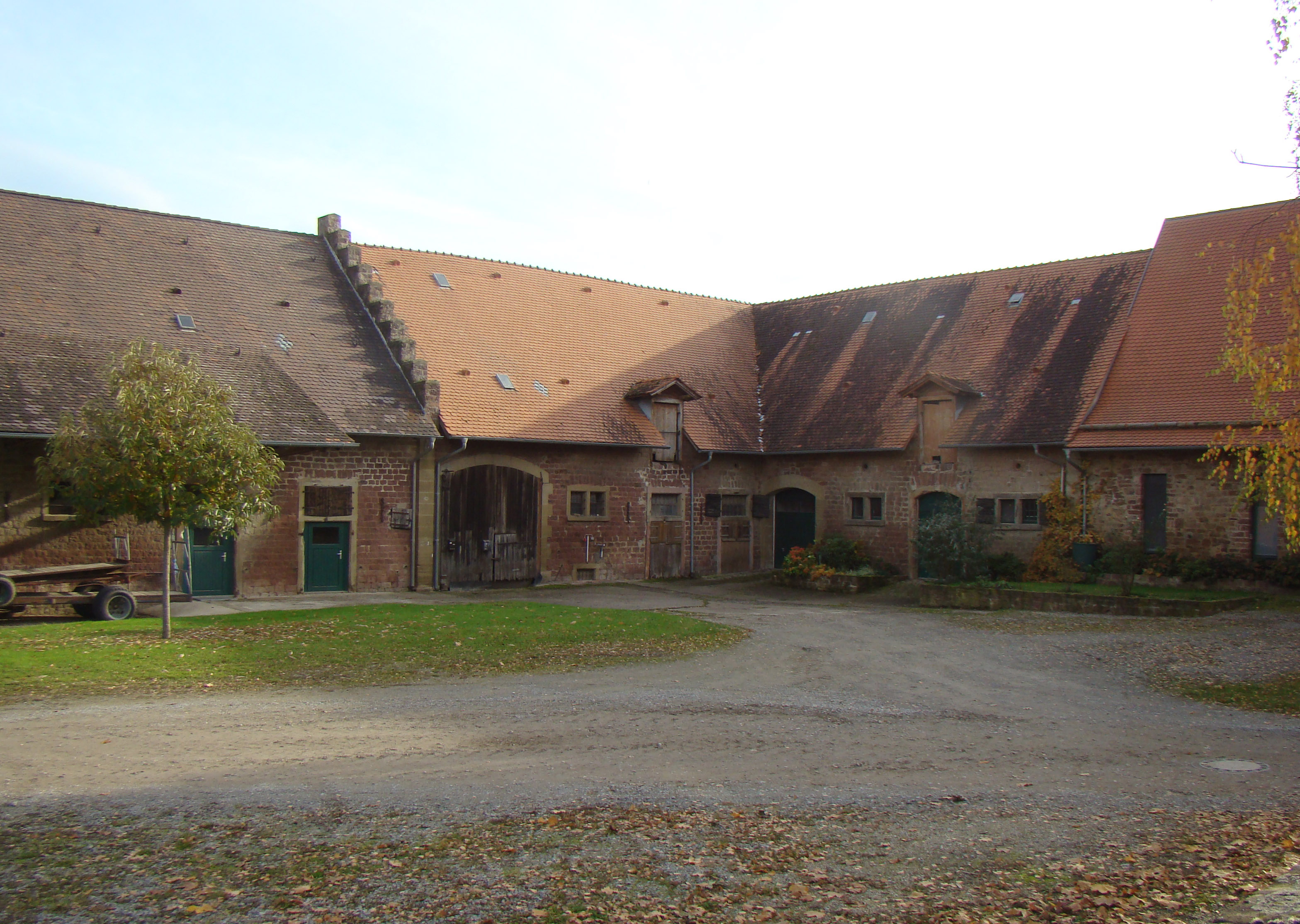 Kloster Lobenfeld, Wirtschaftsgebäude